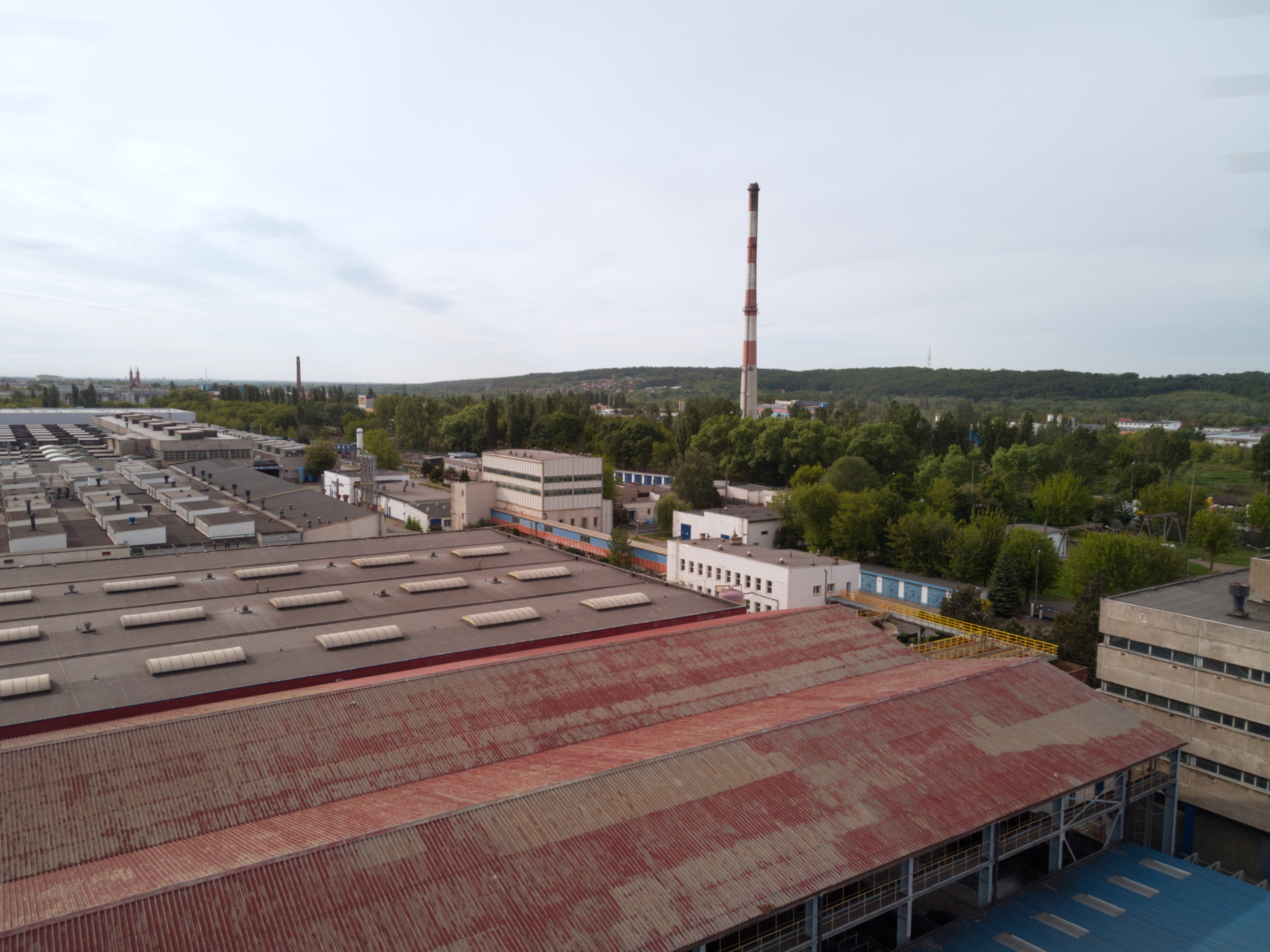 Kazimierza Wielkiego (2020 r.)